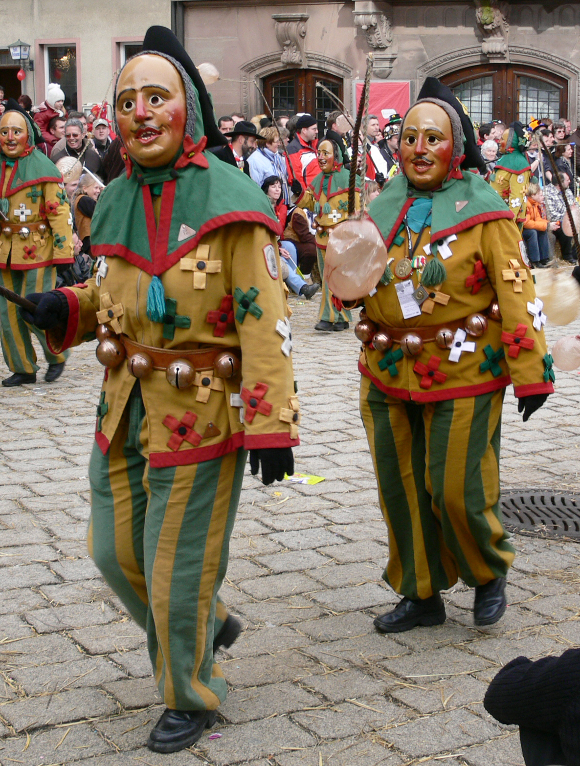 Narrenzunft Gole Riedlingen, Narrenfigur: Kupfernäs Veranstaltung: Narrensprung beim Narrentreffen Meßkirch 2006